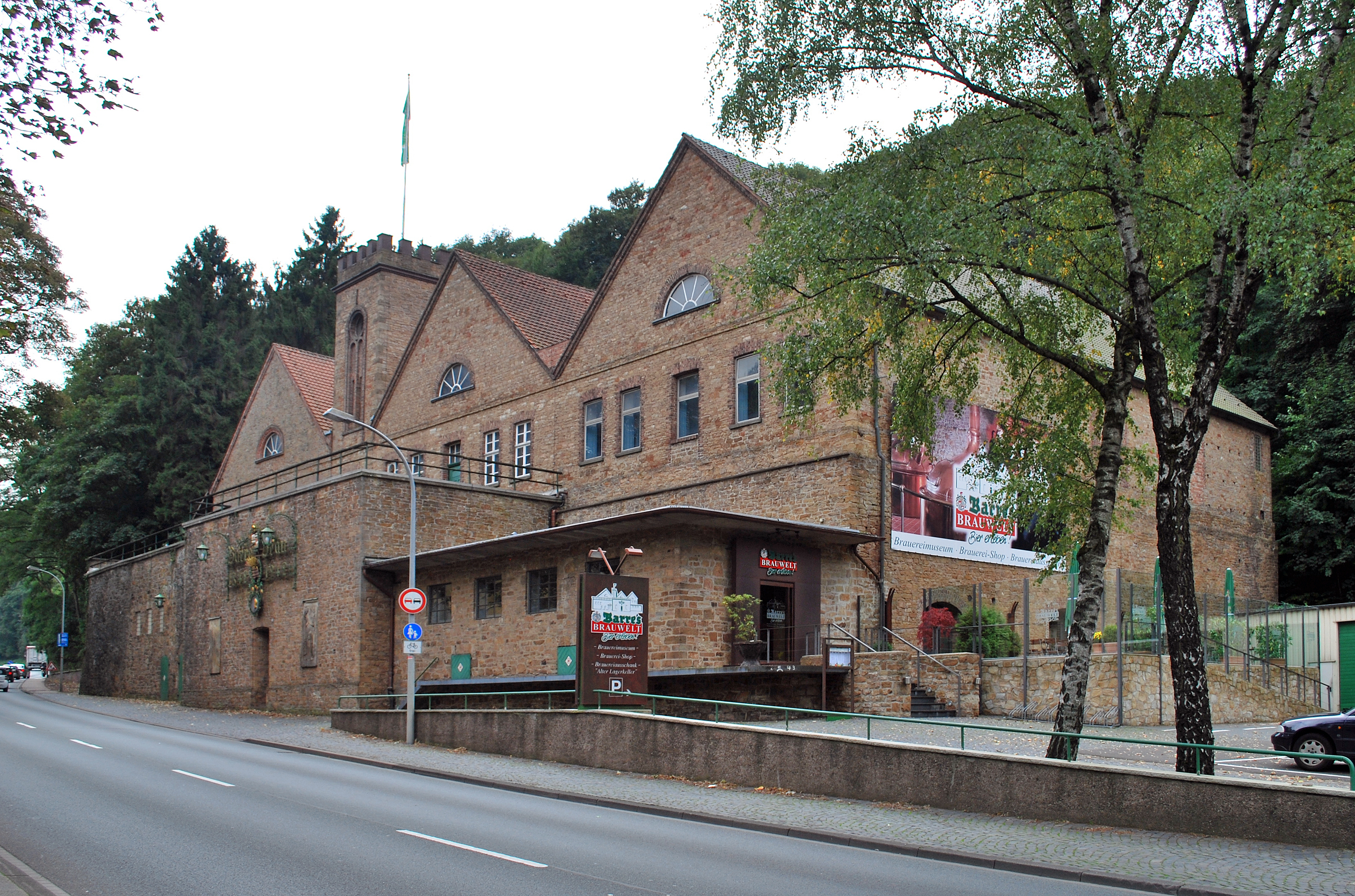 Brauerei Barre, Lübbecke This image shows a heritage building in Germany, located in the North Rhine-Westphalian city Lübbecke (no. 42).